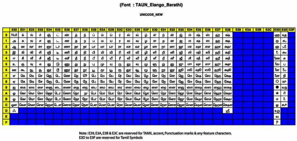 புதிய தமிழ் யுனிகோட் குறிமுறையின் வைப்பு அட்டவணை